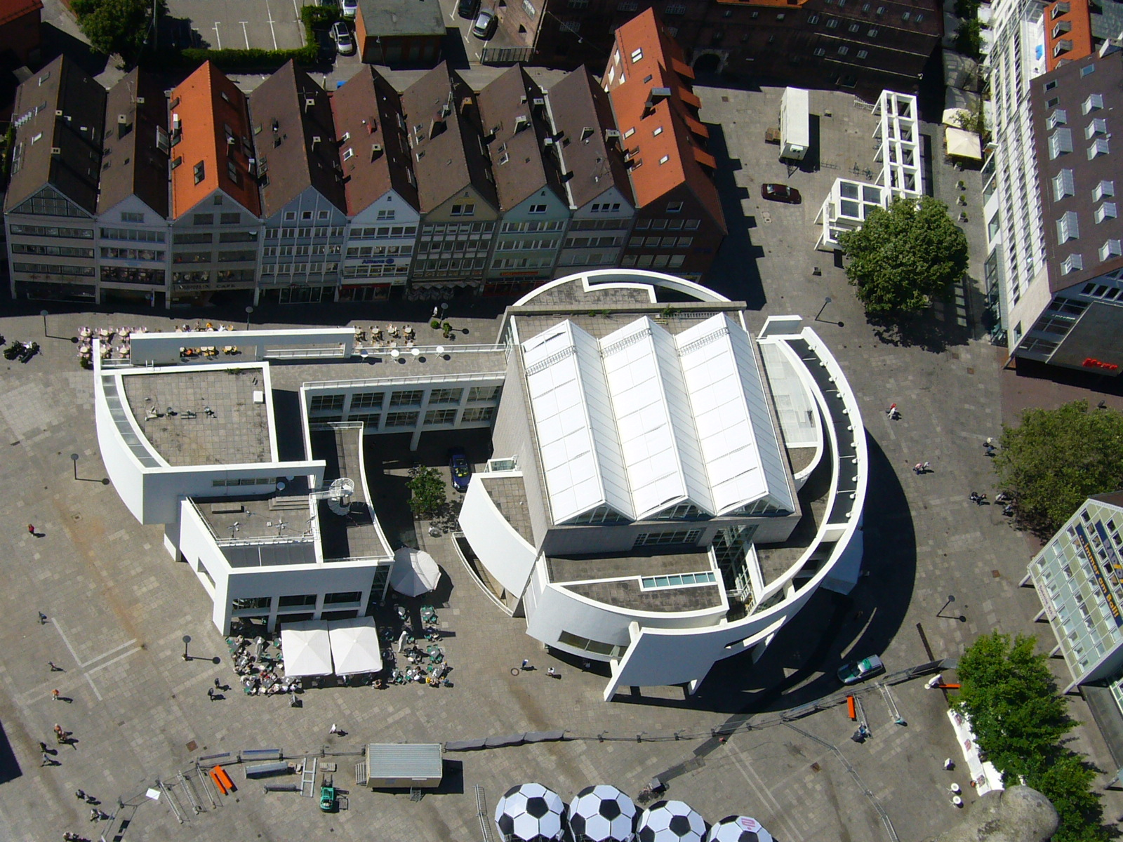 Ulmer Stadthaus. Bau von Richard Meier. Fotografiert vom Turm des Ulmer Münsters.